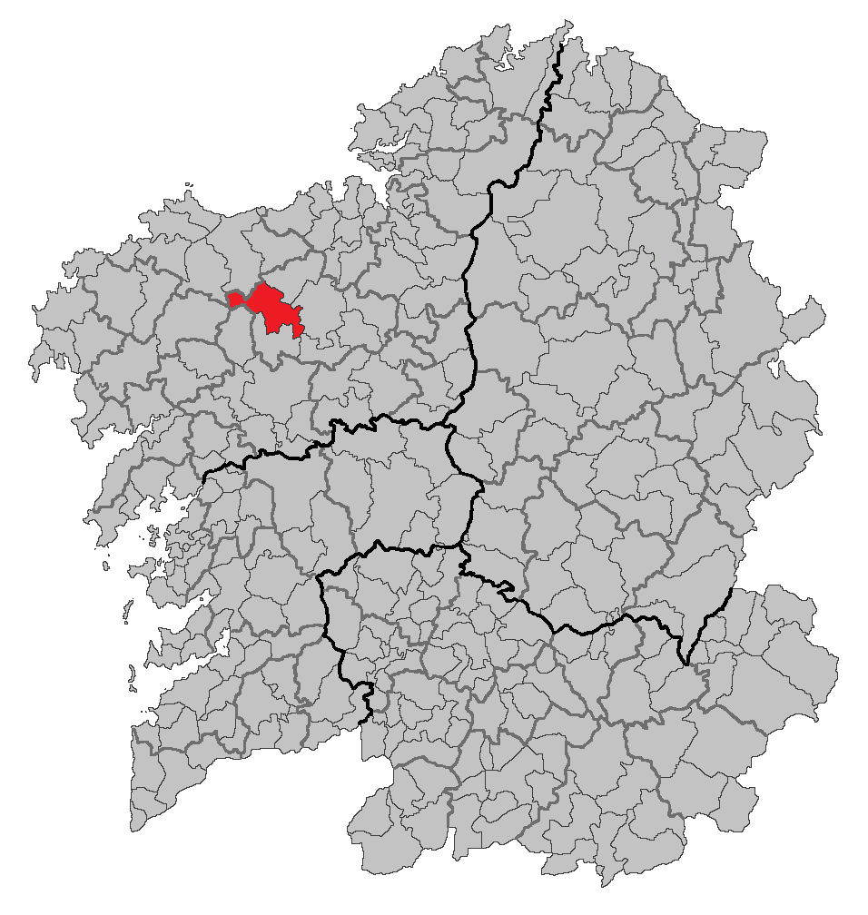 Mapa coa localización do concello de Tordoia.